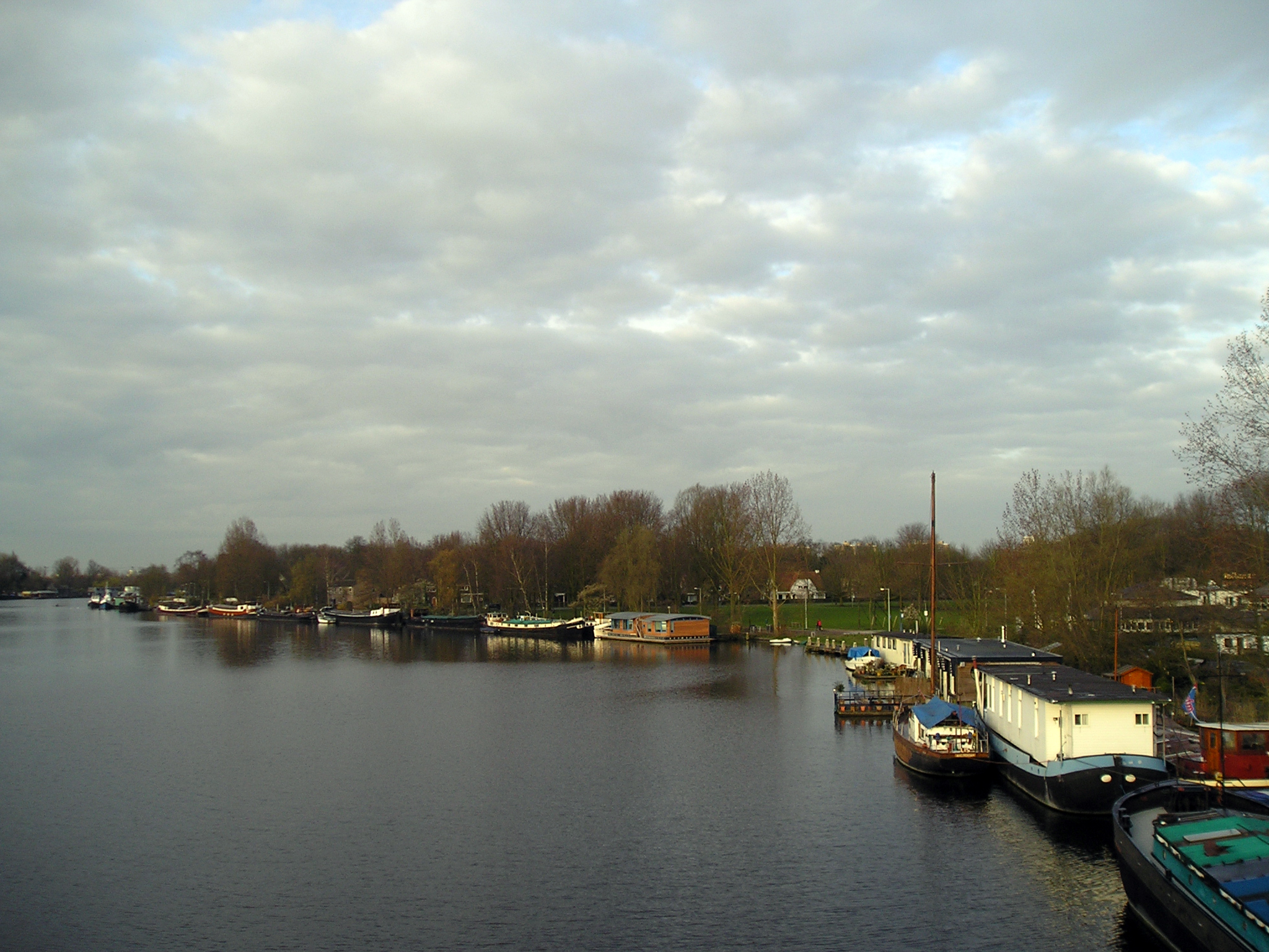 Cà barca dla gent ch'a sta a Amstel, a Amsterdam (house boats on the Amstel river, Amsterdam)